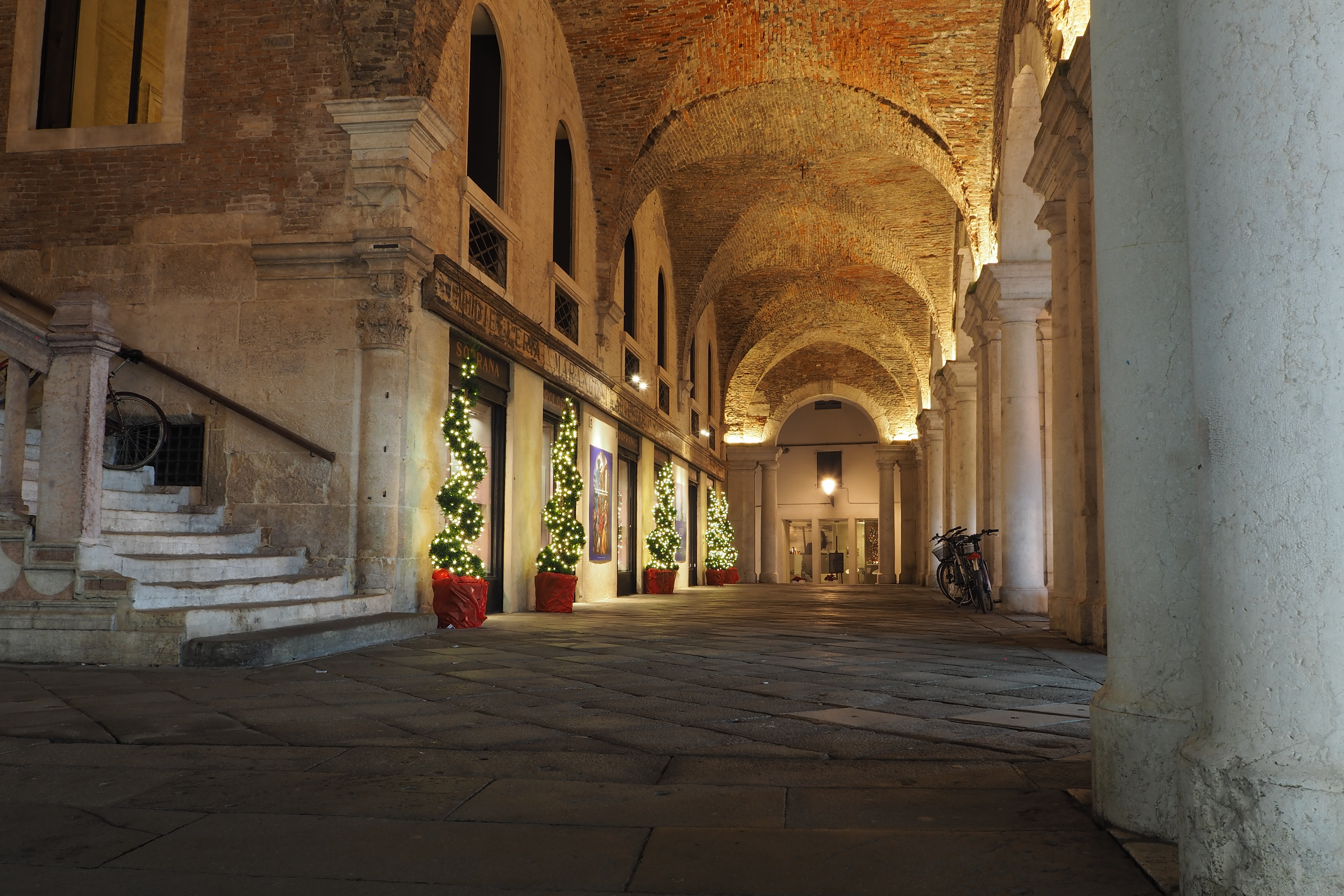 E' un angolo della Basilica Palladiana che riporta al passato, una volta si accedeva al grande salone dalla scalinata This is a photo of a monument which is part of cultural heritage of Italy.